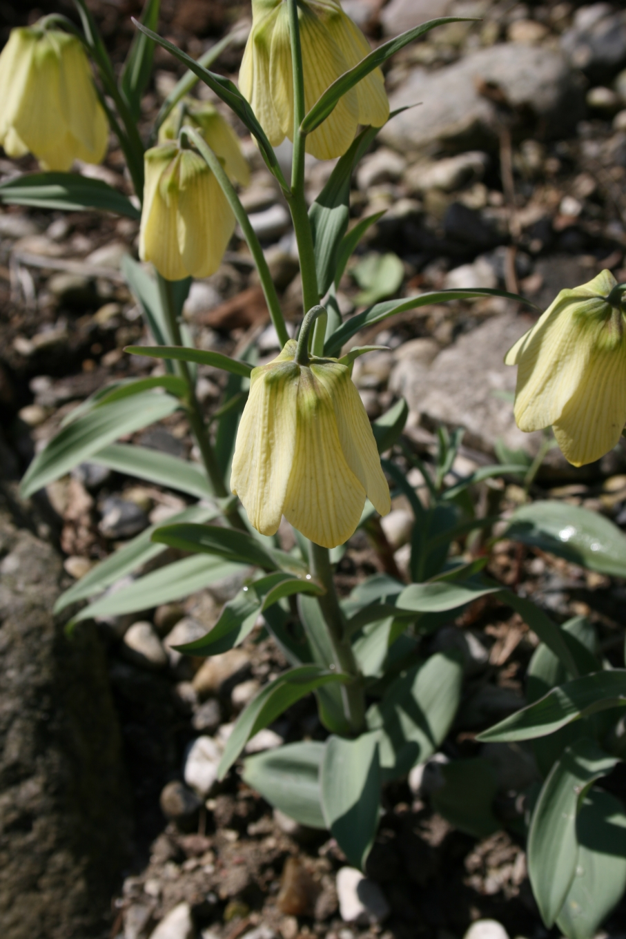 Fritillaria pallidiflora: Habit.